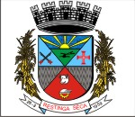 Brasão de Armas do município de Restinga Seca, Rio Grande do Sul, Brasil.